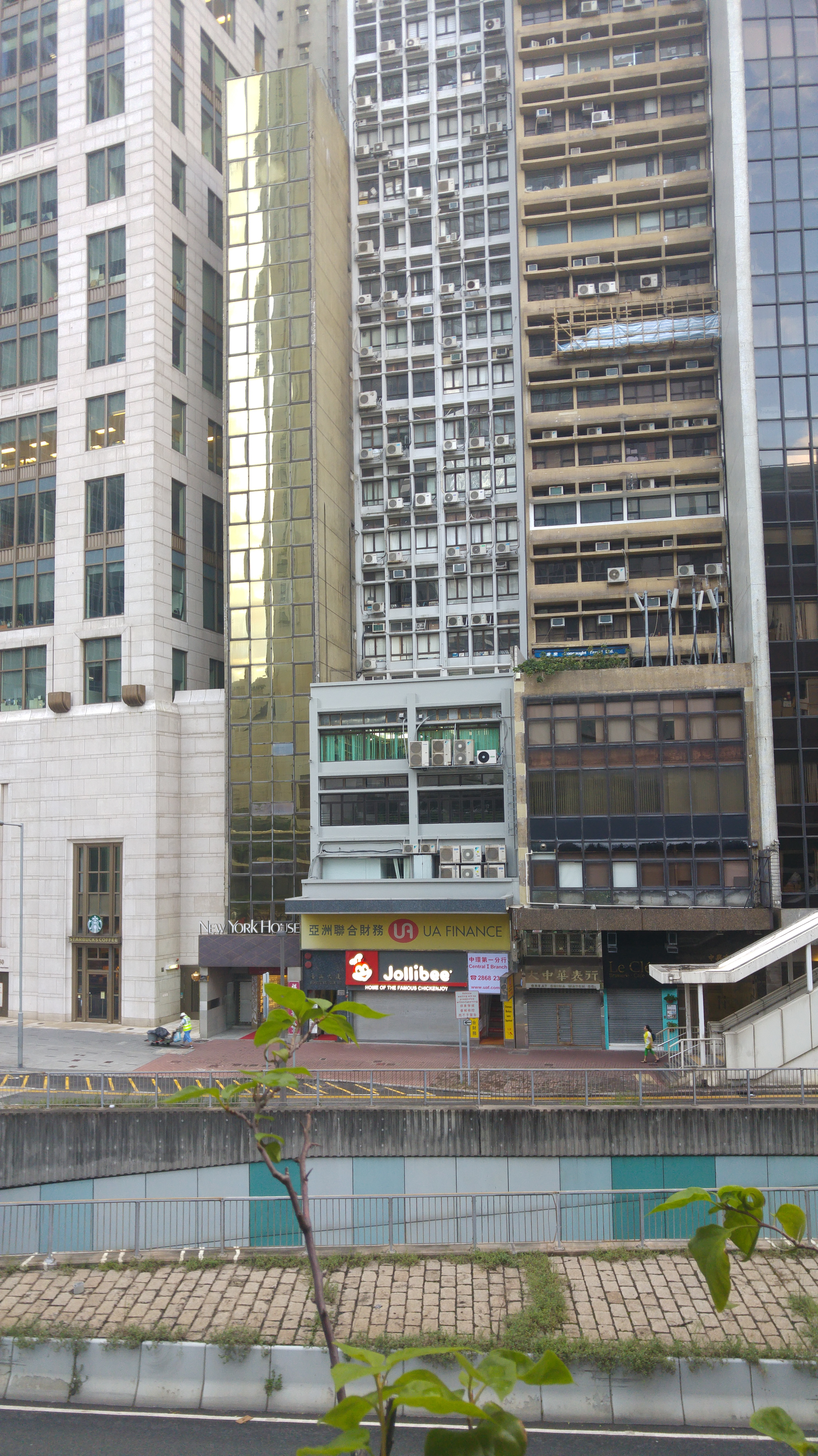 מראה חיצוני של בית הכנסת שובה ישראל בהונג קונג